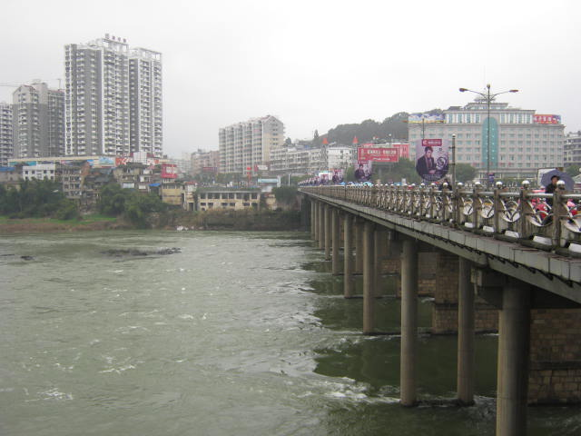 Bridge Shui Xi (水西大桥)